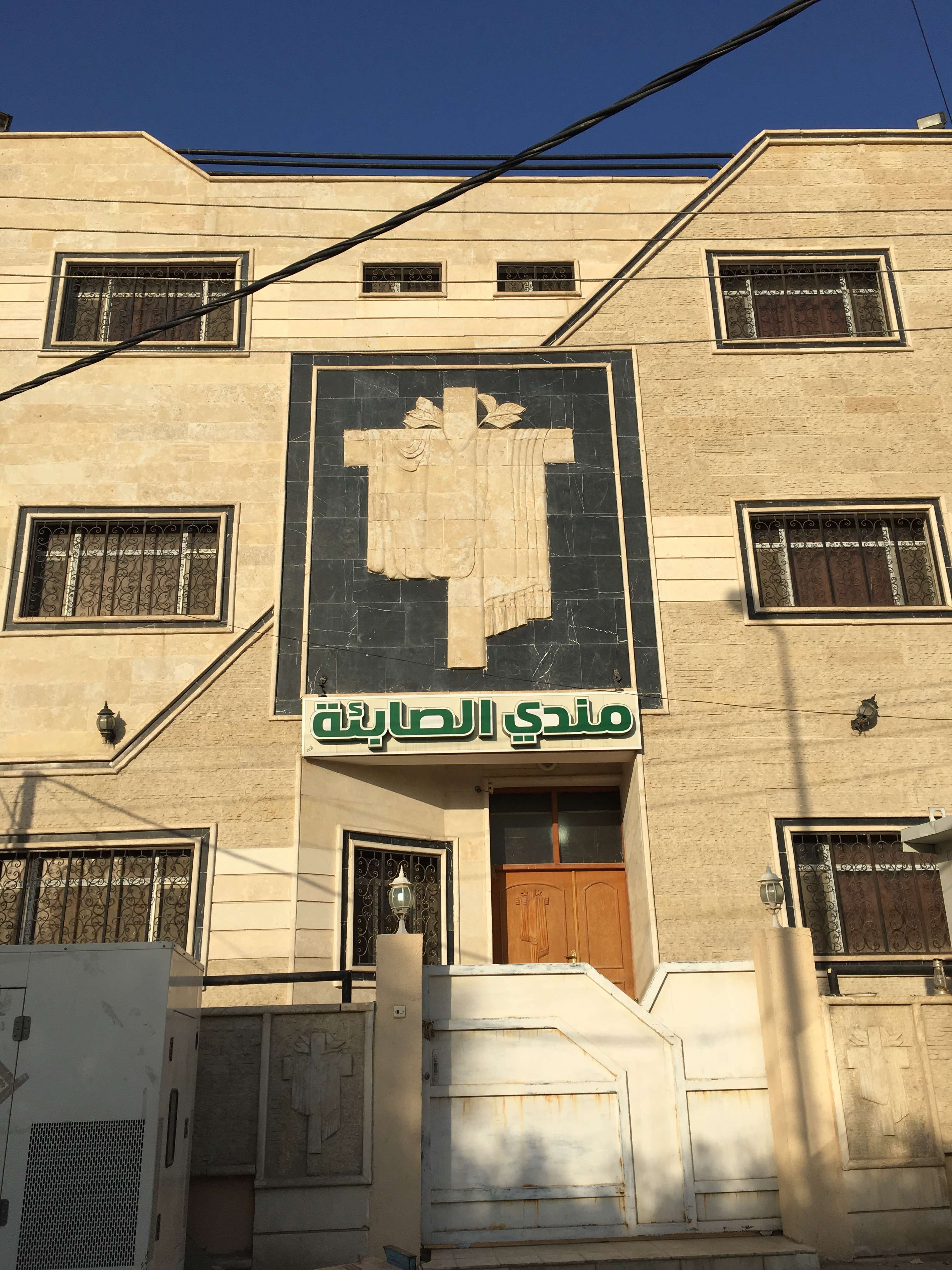 مندي الصابئة المندائيين في مدينة الناصرية جنوب العراق 2016 Mandaean place of worship - Mandi, Nasiriya Iraq 2016